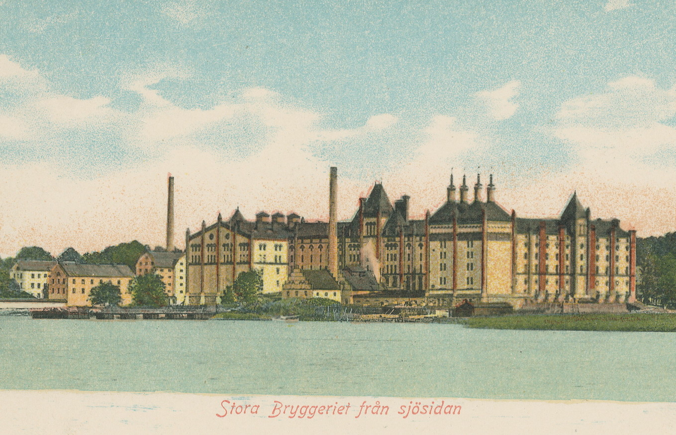 Stora Bryggeriet sjösidan, vykort